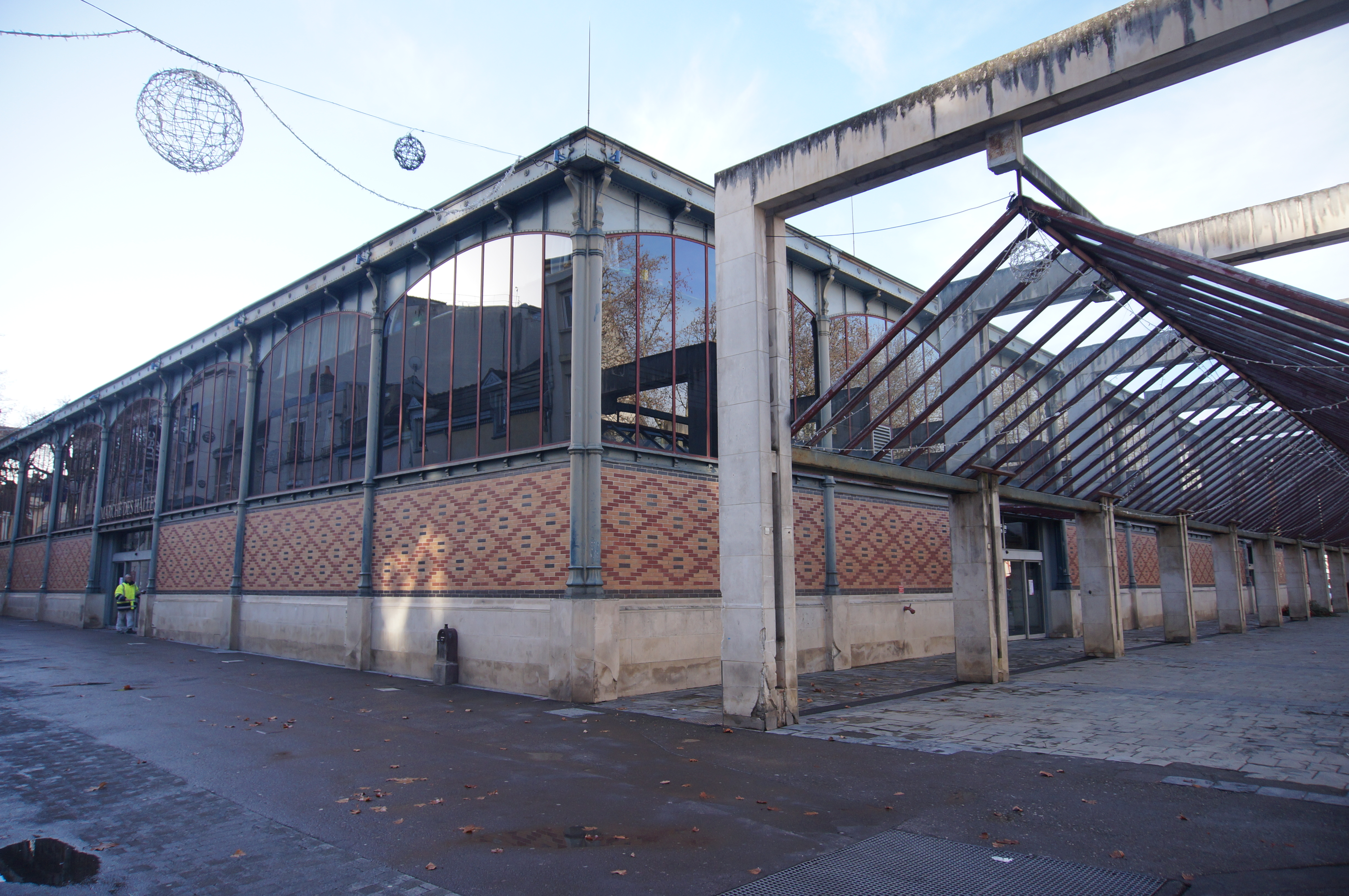 Le Marché des Halles de Troyes, dans l'Aube.